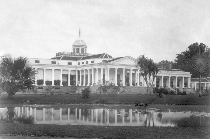 Foto. Het paleis van de Gouverneur-Generaal in Buitenzorg